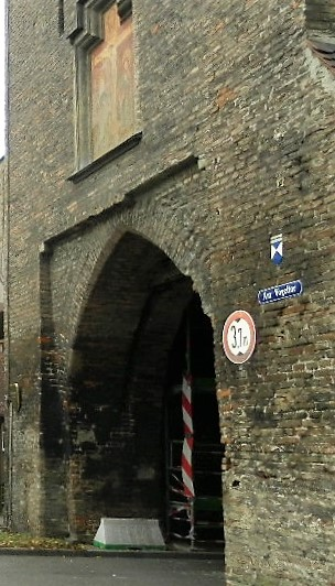 Verwitterungsschäden am Vogeltor, ausgelöst durch Abgase zahlreich vorbeifahrender Motorfahrzeuge.